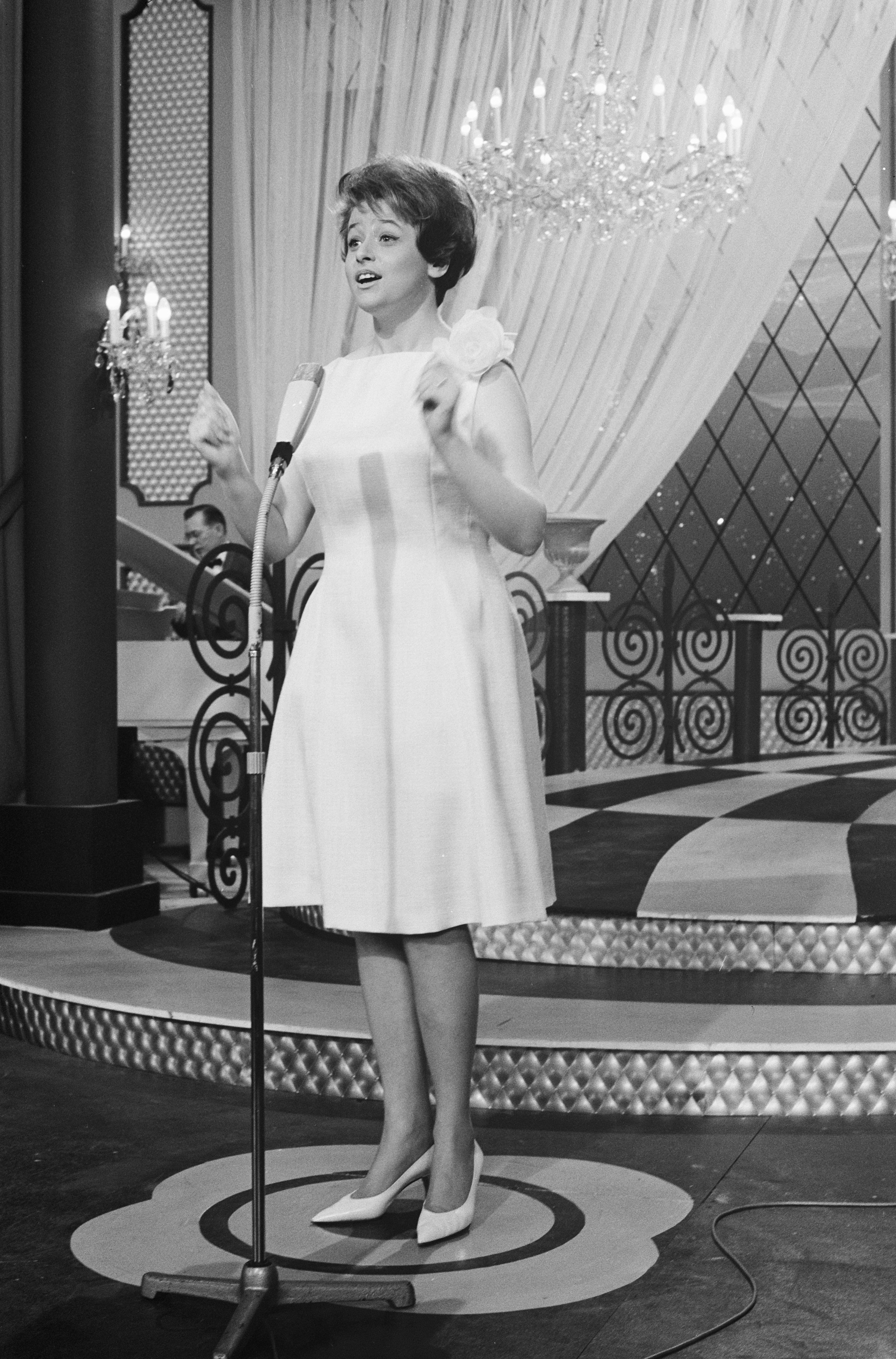 Collectie / Archief : Fotocollectie Anefo Reportage / Serie : [ onbekend ] Beschrijving : Eurovisie Songfestival 1962 te Luxemburg, voor Finland Marion Rung Datum : 18 maart 1962 Locatie : Finland, Luxemburg Trefwoorden : artiesten, songfestivals Persoonsnaam : Rung Marion Fotograaf : Pot, Harry / Anefo Auteursrechthebbende : Nationaal Archief Materiaalsoort : Negatief (zwart/wit) Nummer archiefinventaris : bekijk toegang 2.24.01.05 Bestanddeelnummer : 913-6606